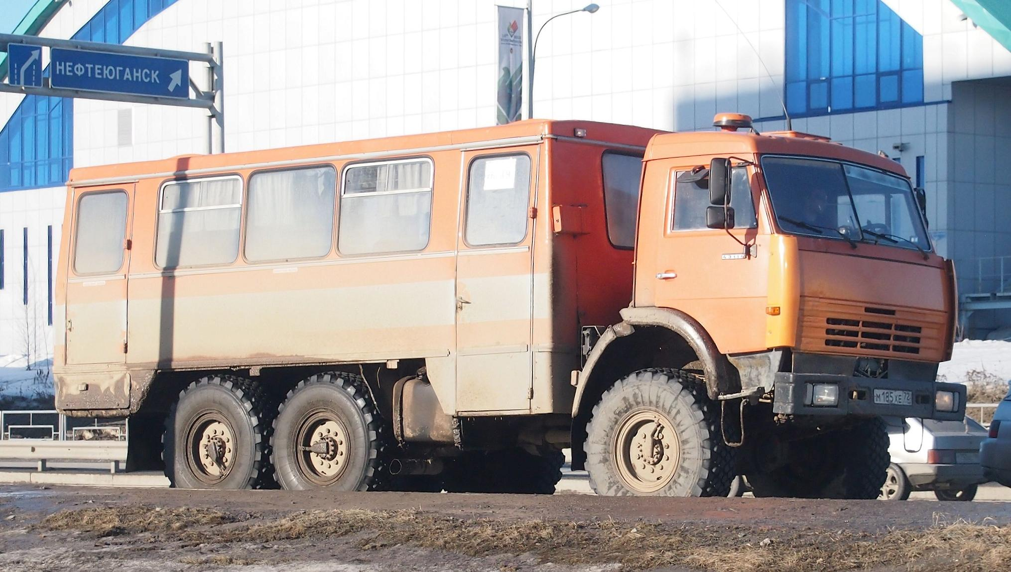 НефАЗ-4208 на шасси КАМАЗа-43114 в Ханты-Мансийске